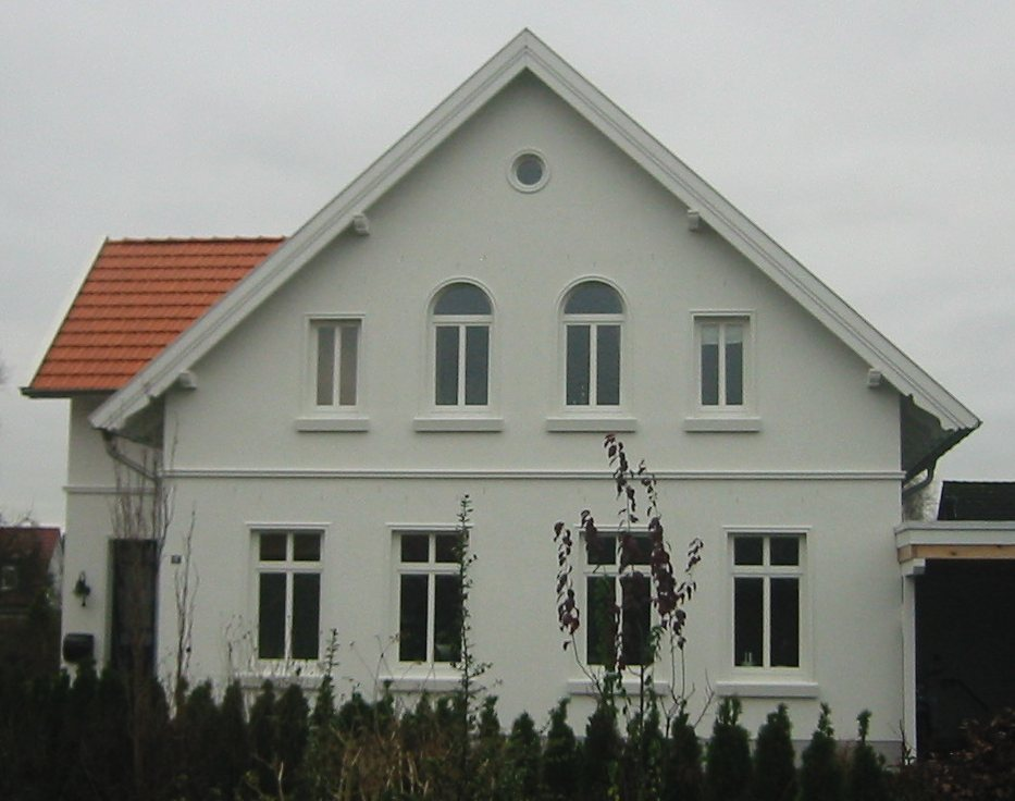 Abbildung einer Oldenburger Hundehütte.